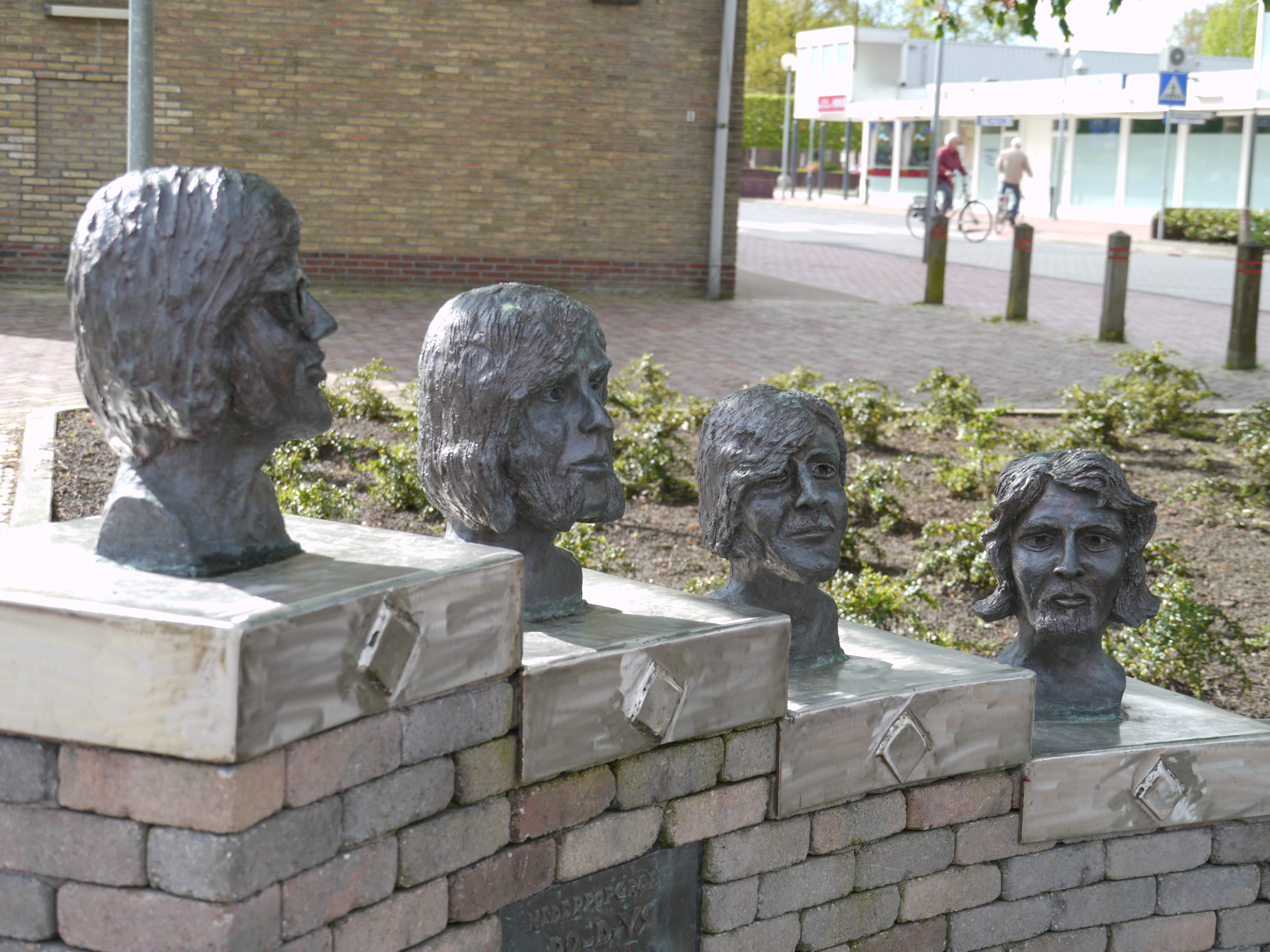 In Oude Pekela staat op het Raadhuisplein staan de vier koppen van de Neder Popgroep The Ro-d-ys